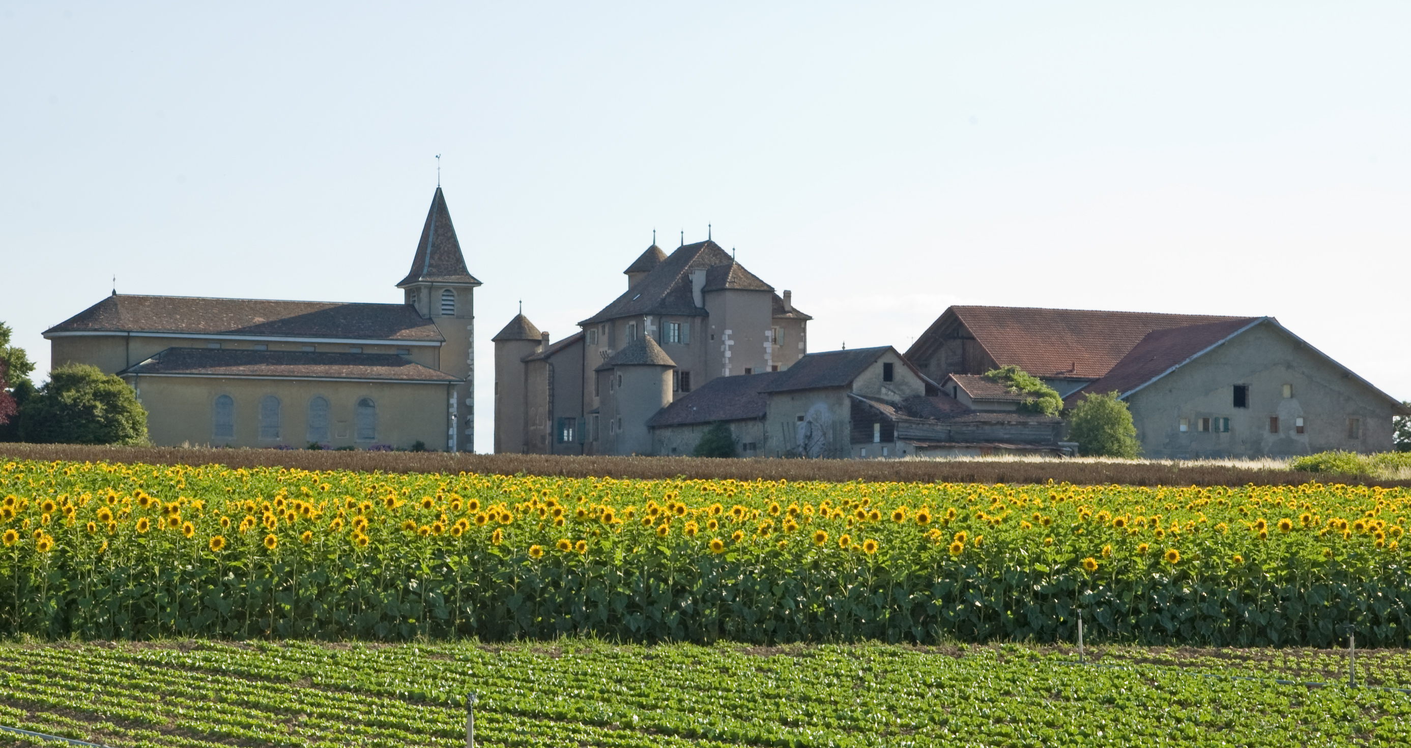 La Commanderie de Compesières vue depuis le coté nord.